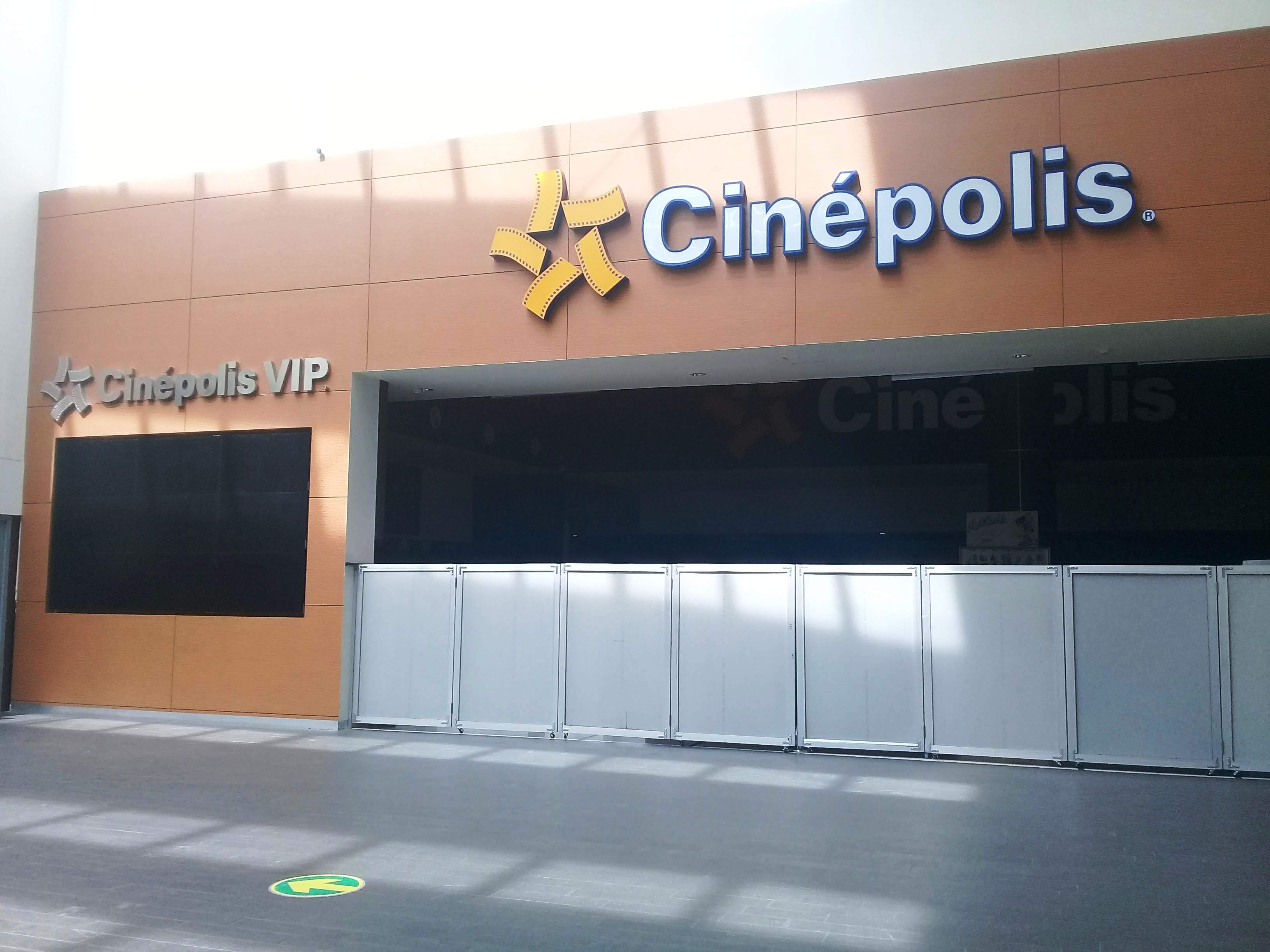 Cinépolis en Galerias Pachuca cerrado por la pandemia de Covid-19